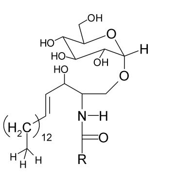 Estructura molecular de un esfingoglicolípido